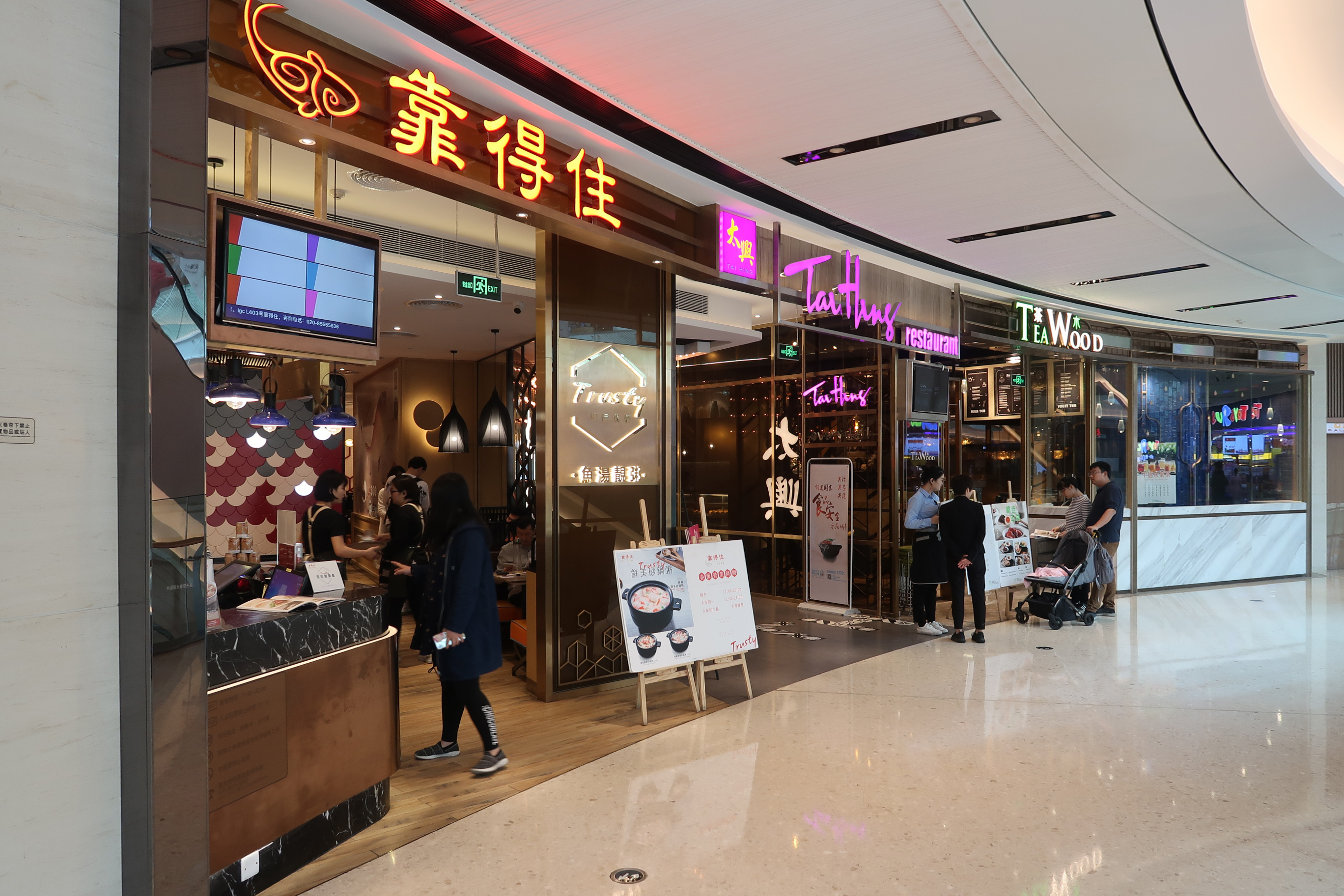 Tai Hing Restaurant in IGC Guanzhou